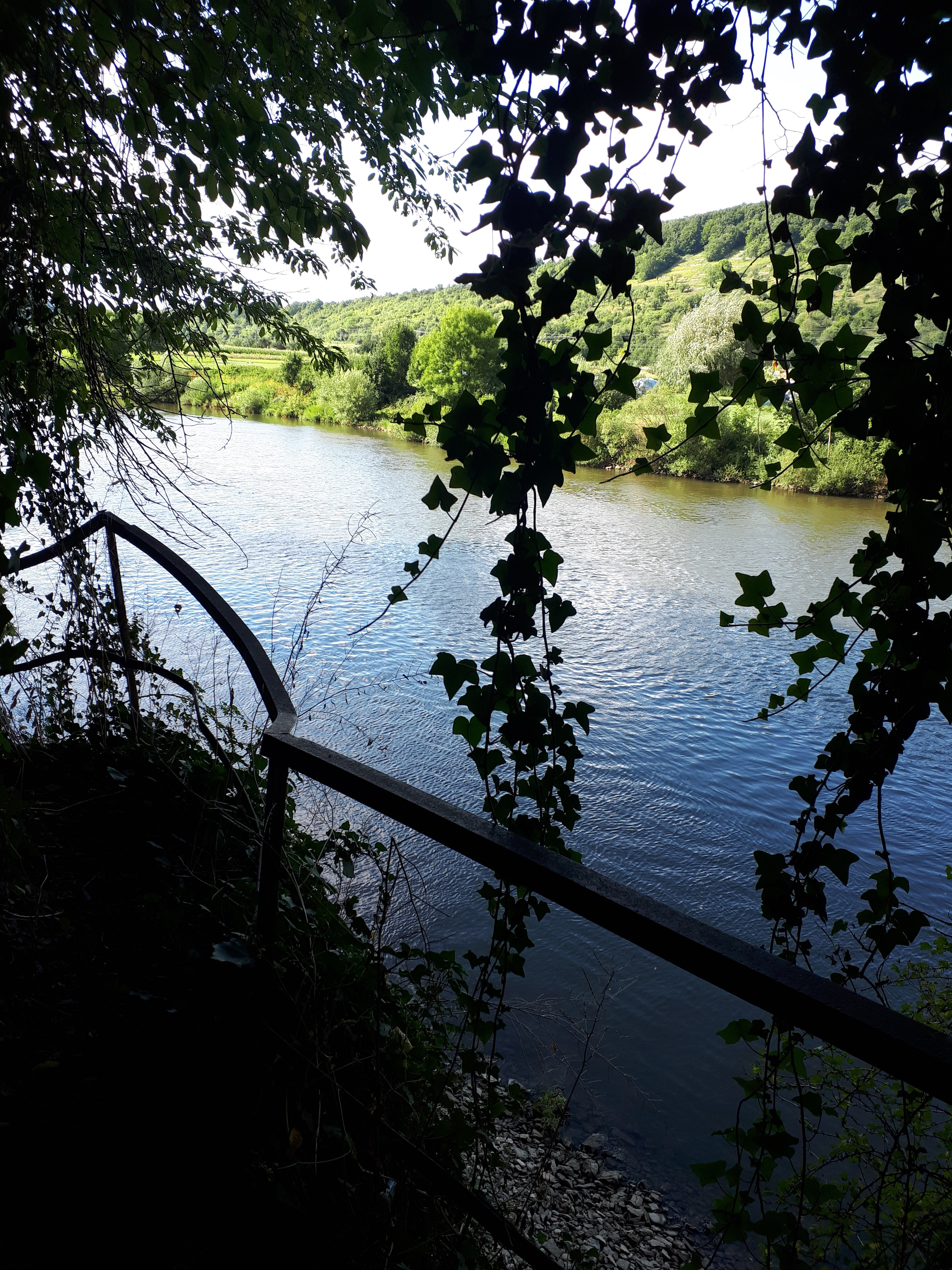 Sicht aus der Höhle Richtung Neckar. Aufgenommen 22.07.17